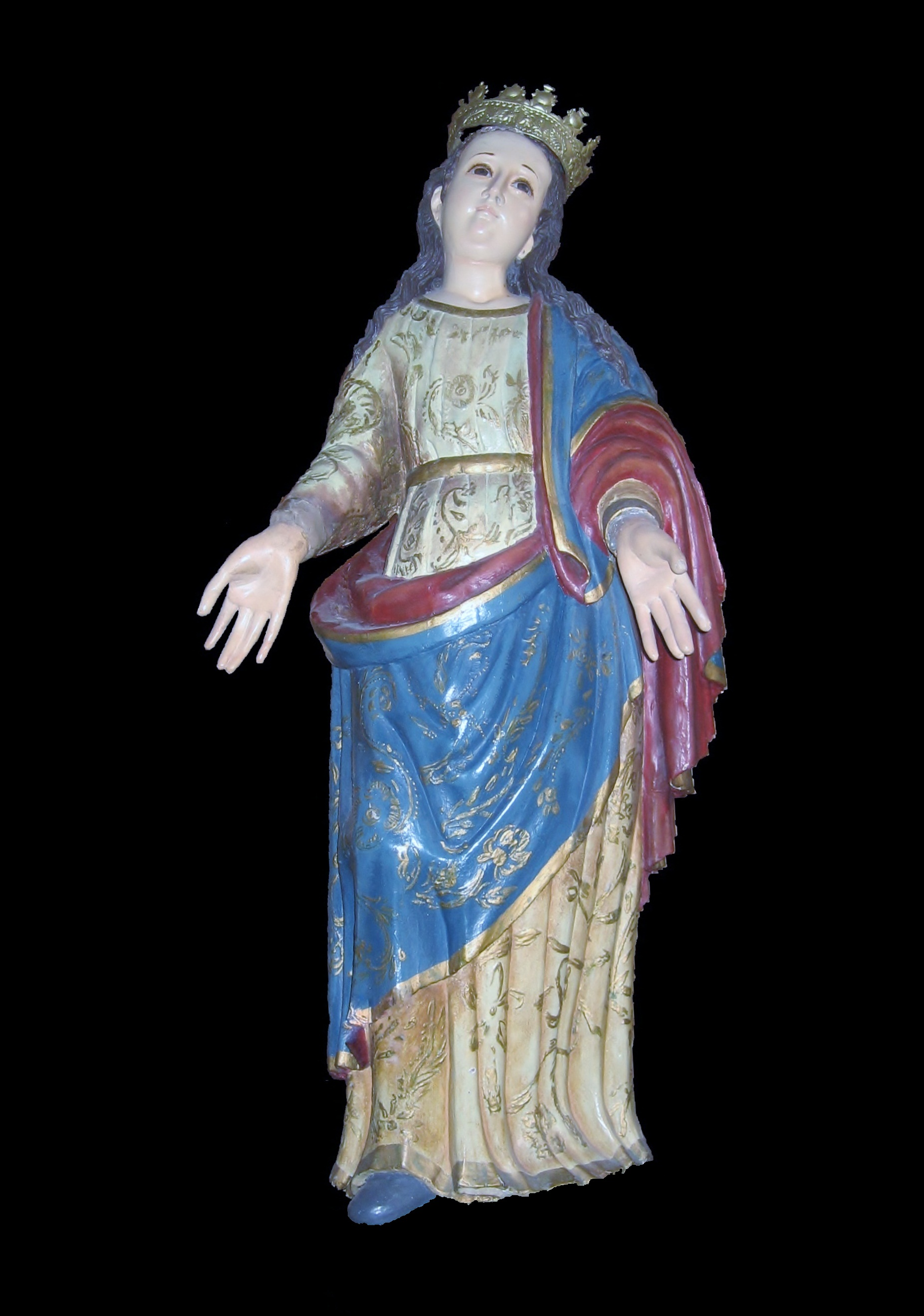 Imagen de la Virgen María en su advocación de la Asunción, patrona de Sébaco, Nicaragua. Es de la época colonial, no sabemos fecha exacta. Se encuentra en el Templo Nuestra Señora de la Asunción en Sëbaco.